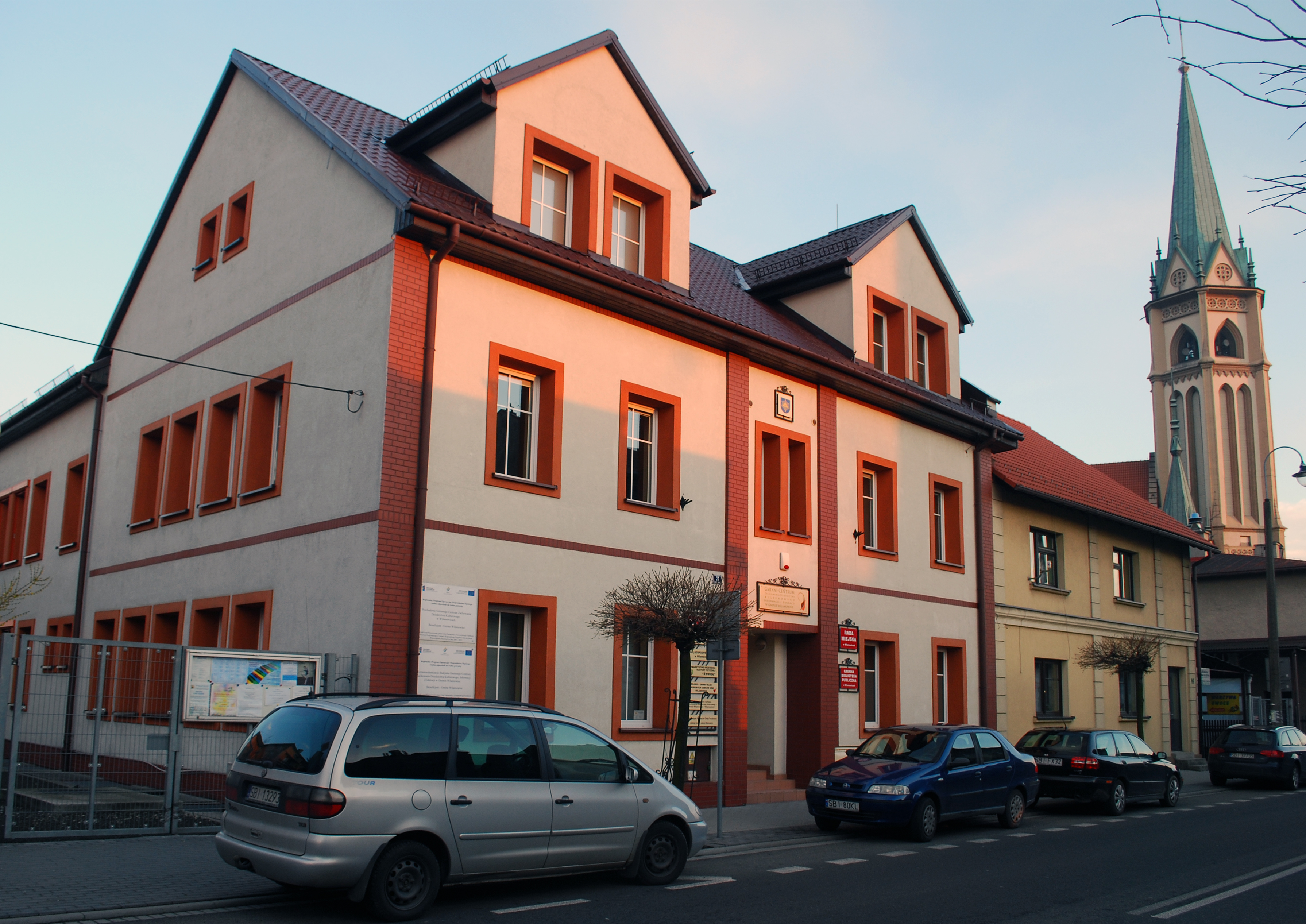 Wilamowice ul. Jana Paderewskiego - Urząd miasta